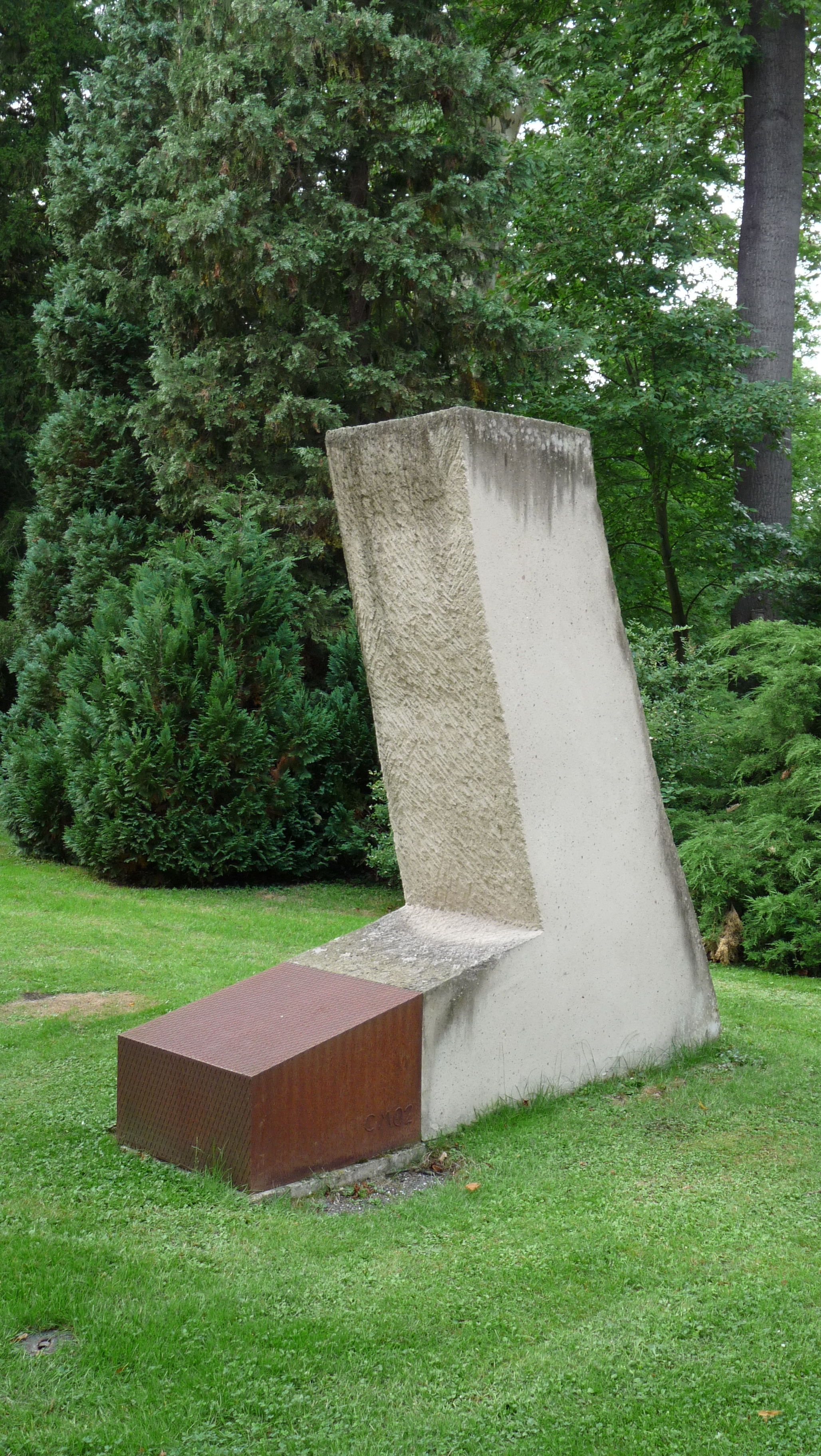 Skulptur Großer Winkel (2002) von Christoph Mancke. Entstanden anlässlich des Bildhauersymposium Skulpturenweg 2002, Bad Neuenahr. Standort: Kurpark Bad Neuenahr-Ahrweiler